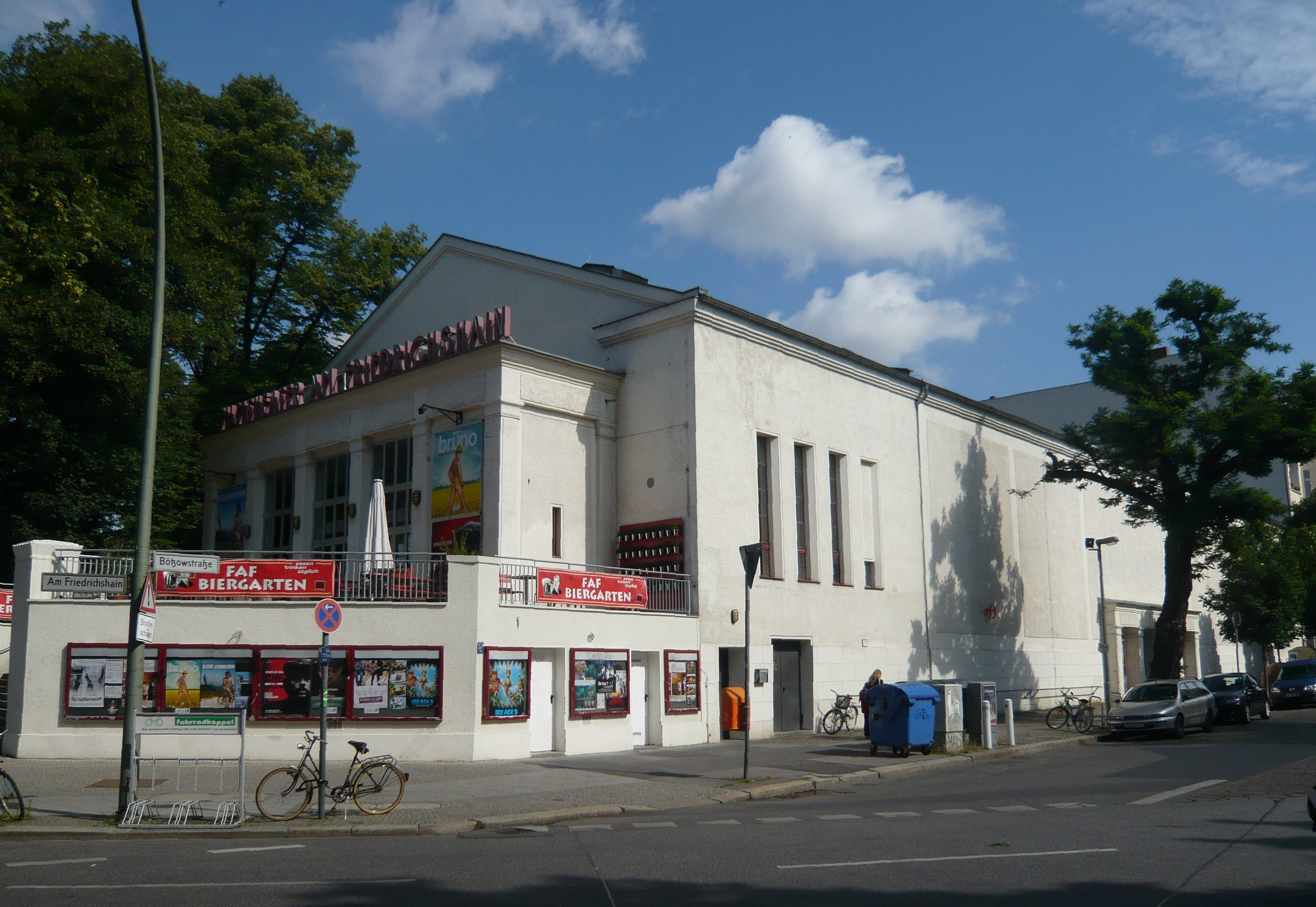 Filmtheater am Friedrichshain